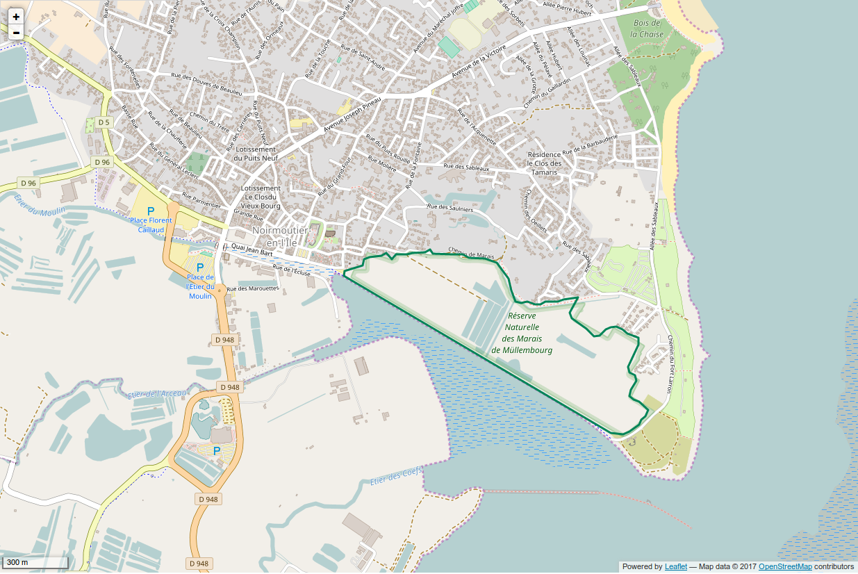 Périmètre de la RNN des marais de Mullembourg.